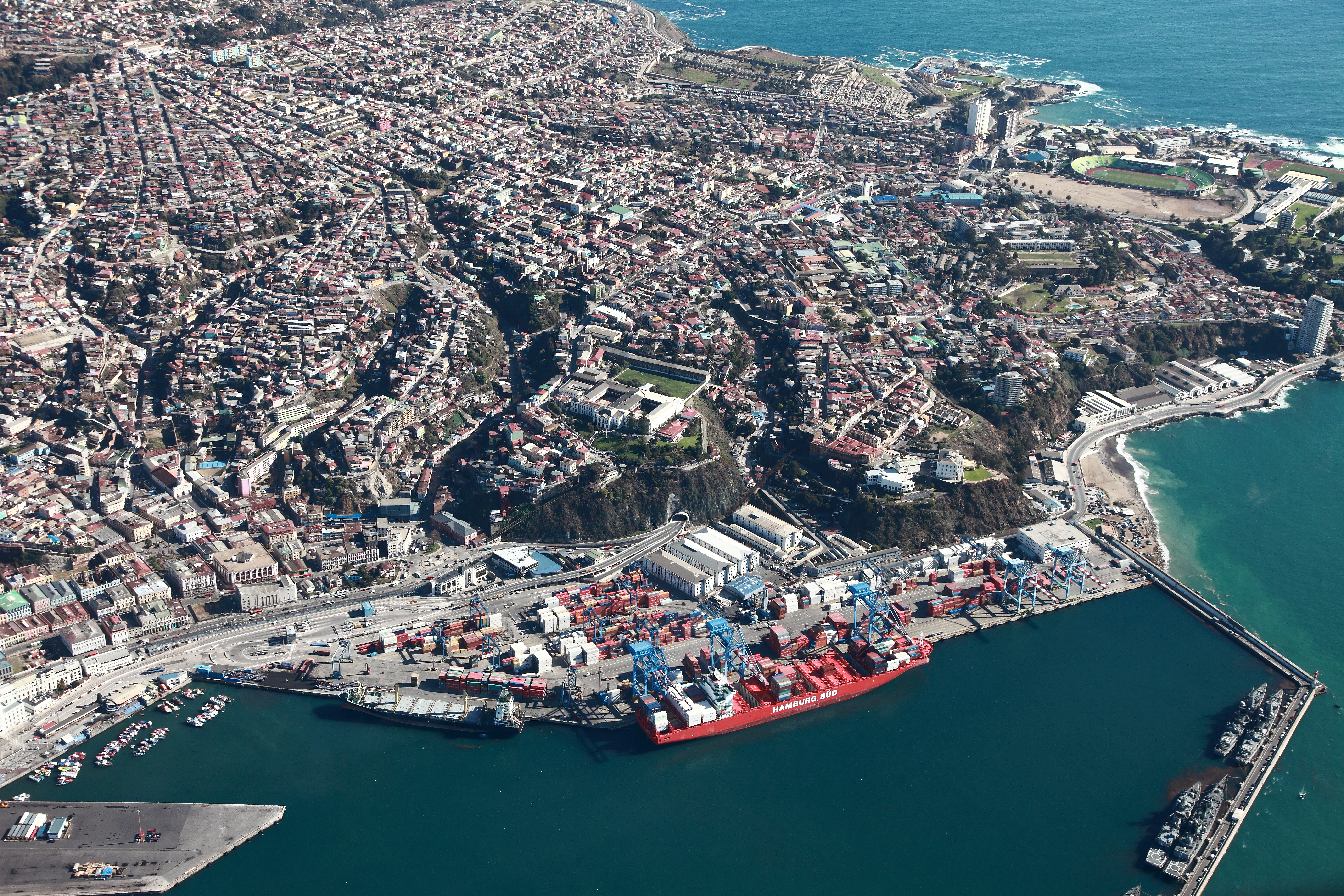 Vista áerea de TPS y la bahía de Valparíso.